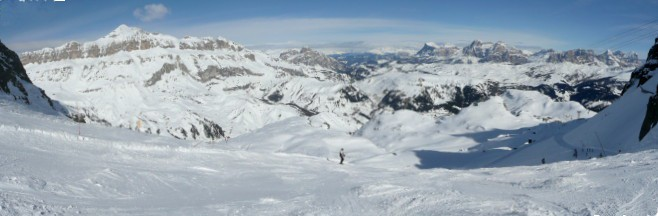 Česky: Pohled z masívu Sella do jednoho z údolí.